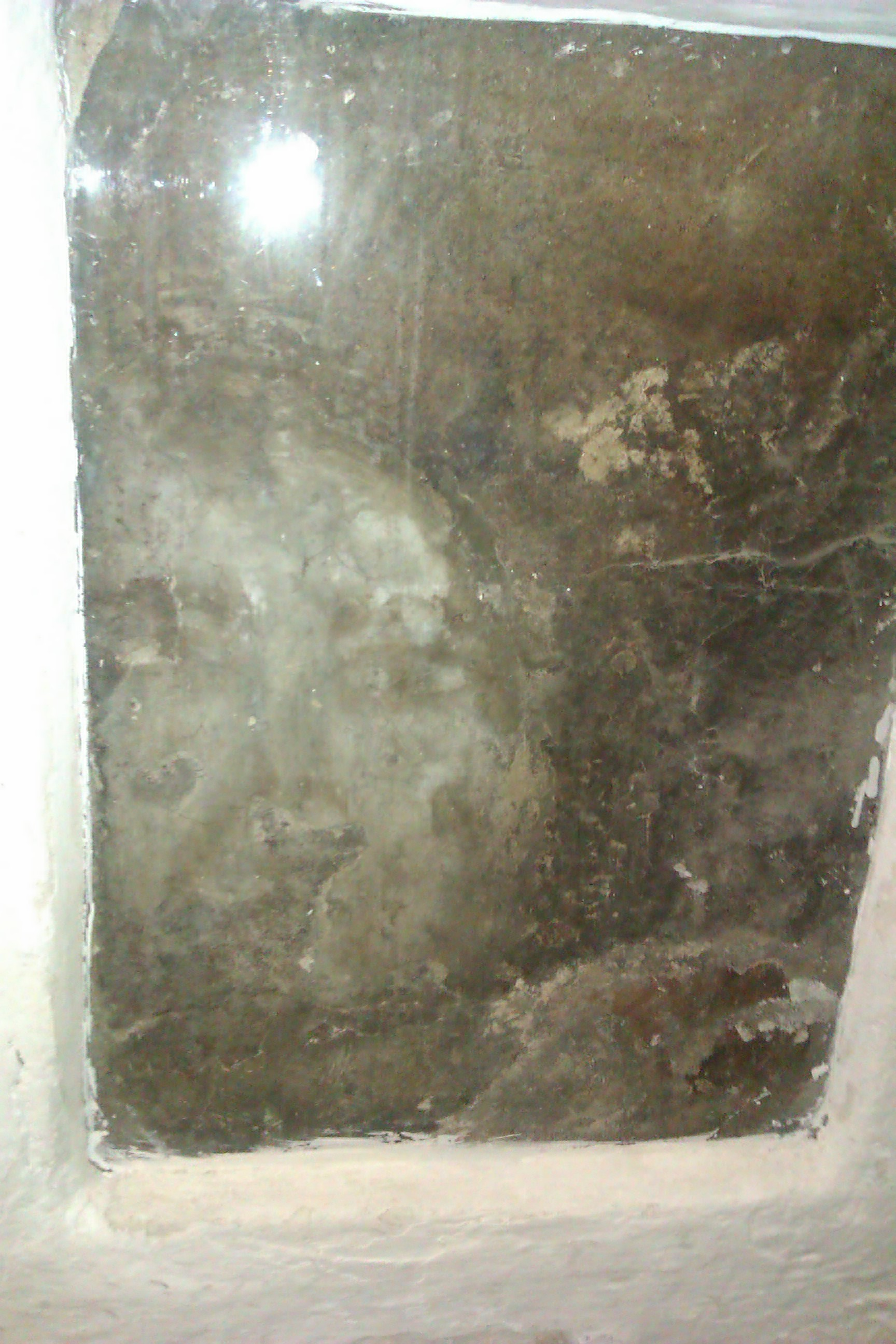 "la Pava", la más famosa de las caras de Bélmez, hoy empotrada en la pared del cuarto de estar de la casa de María Gómez y protegida por un cristal.